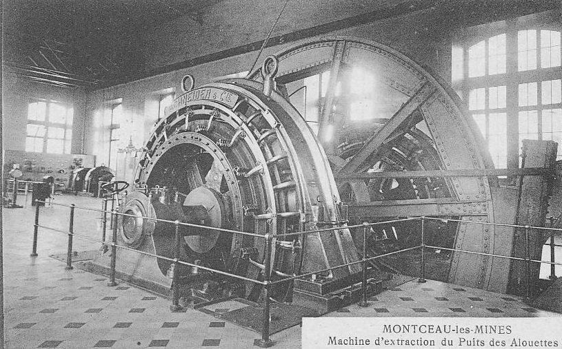 La machine d'extraction du puits des Alouettes.